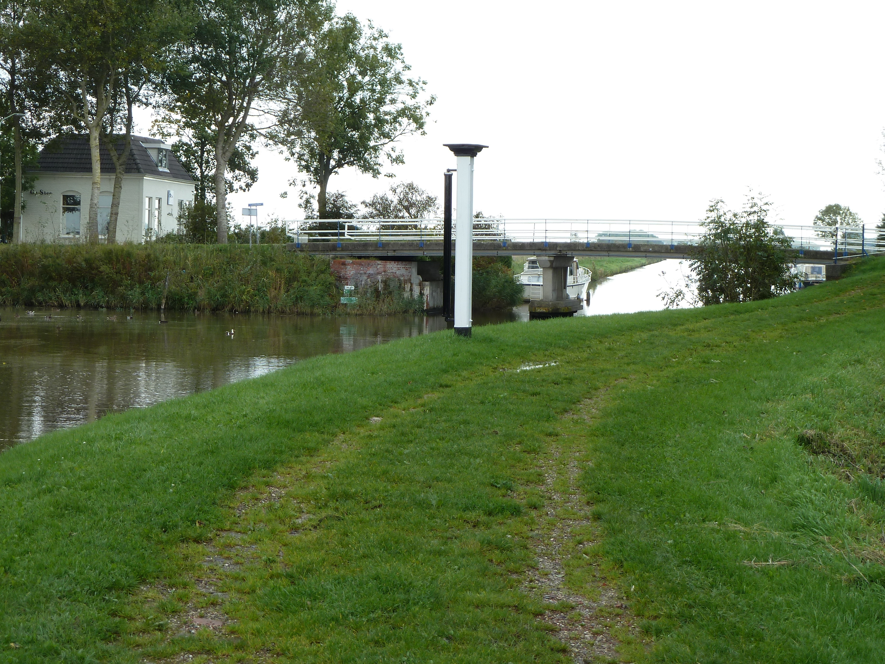 Gezicht op de Leenstertil (nu een vaste brug) over het Hunsingokanaal met op de voorgrond een rolpaal.